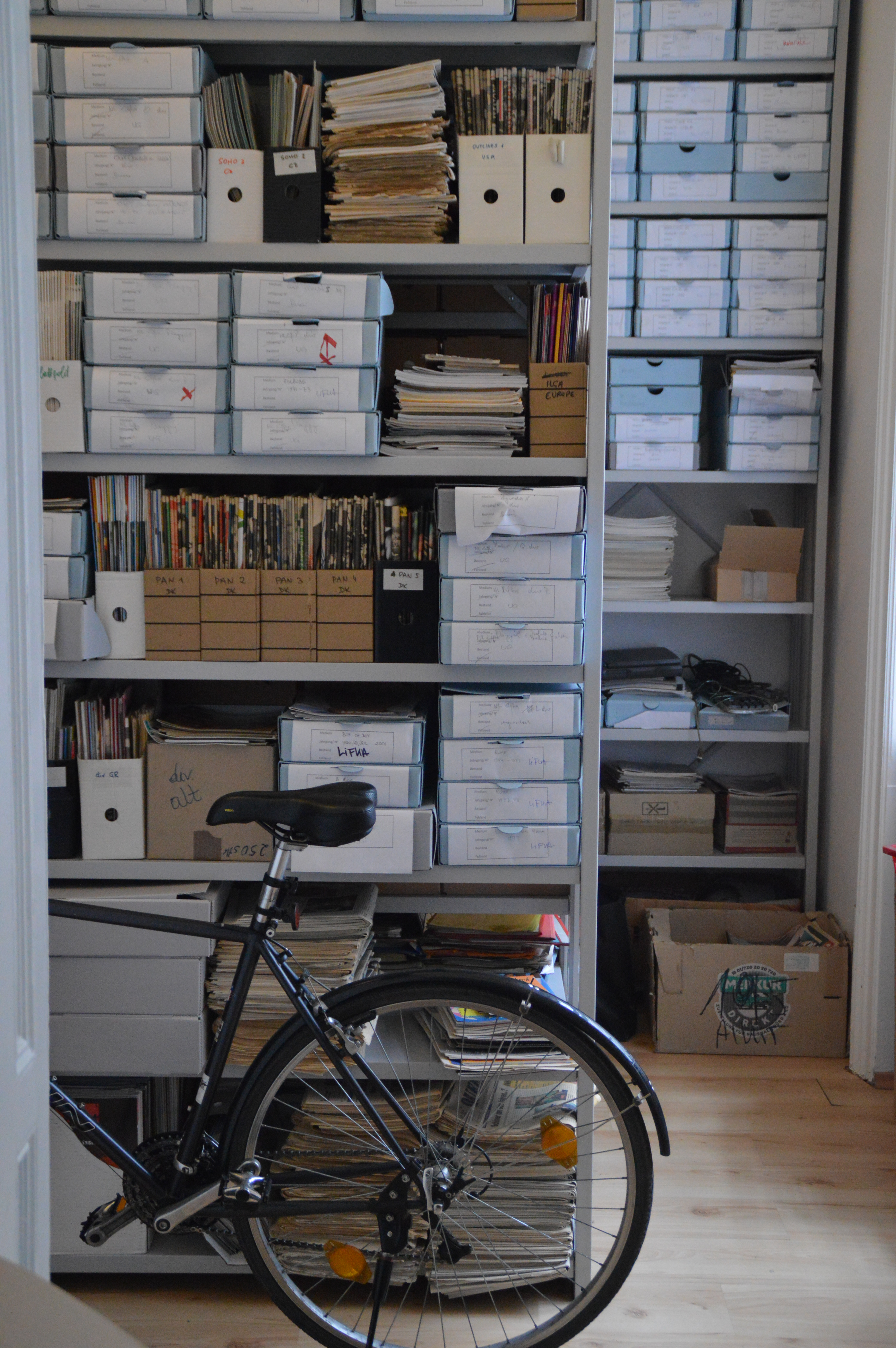 Arbeitsbereiche